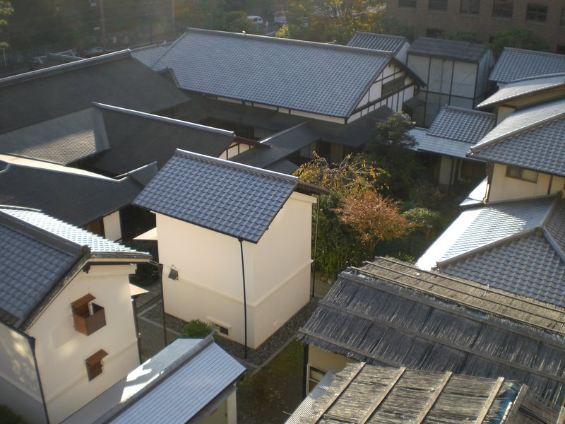 冷泉家（京都府上京区）